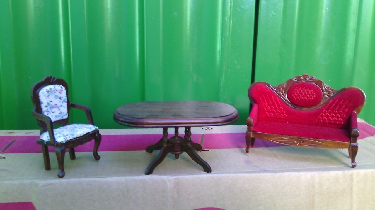 Mini móveis da coleção Crie e monte sua casa vitoriana da Planeta deAgostini.